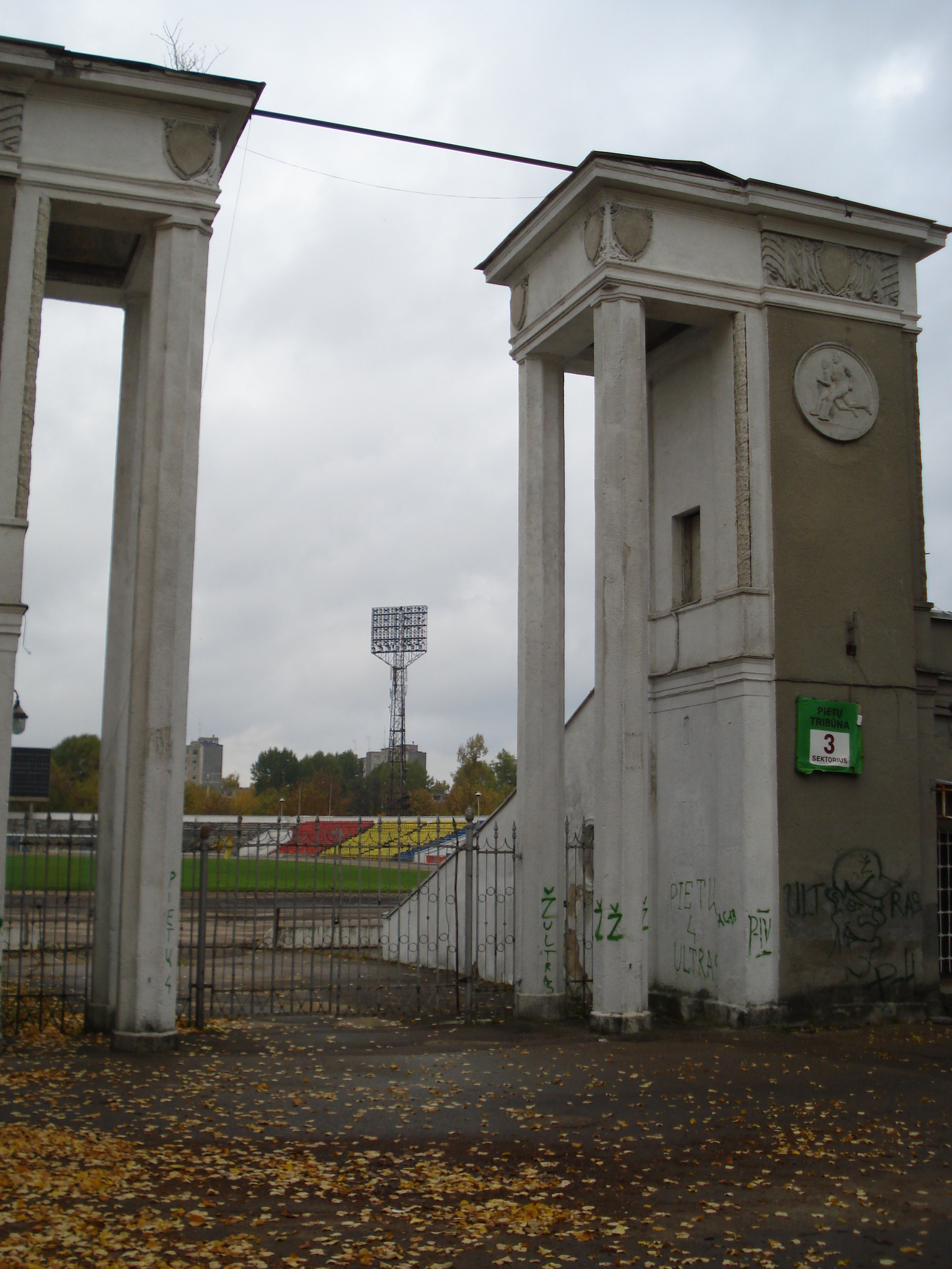 Žalgiris Stadium in Vilnius. Main entrance. Build in 1950